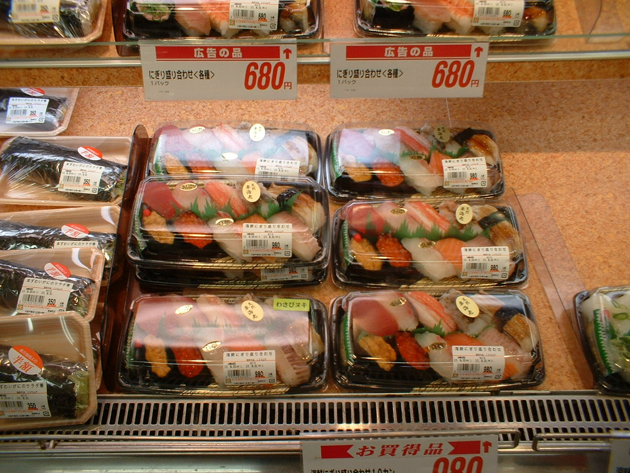 Sushi sold at a supermarket (スーパーで売っているお寿司)